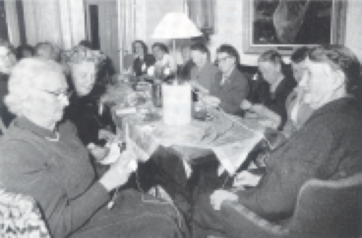 Göteborgs kvinnliga diskussionsklubb organiserade Måndagshjälpen för Europas nödlidande